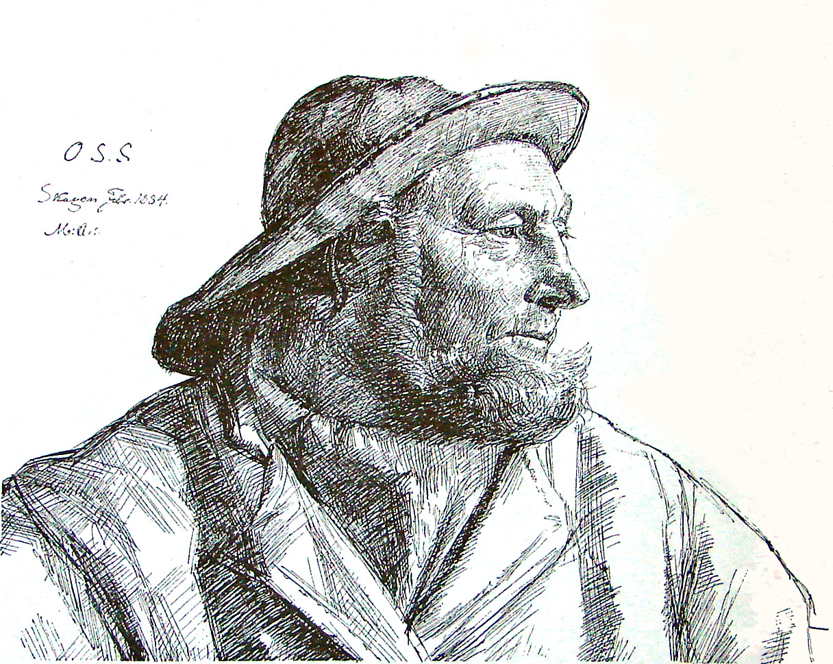 Skagbo